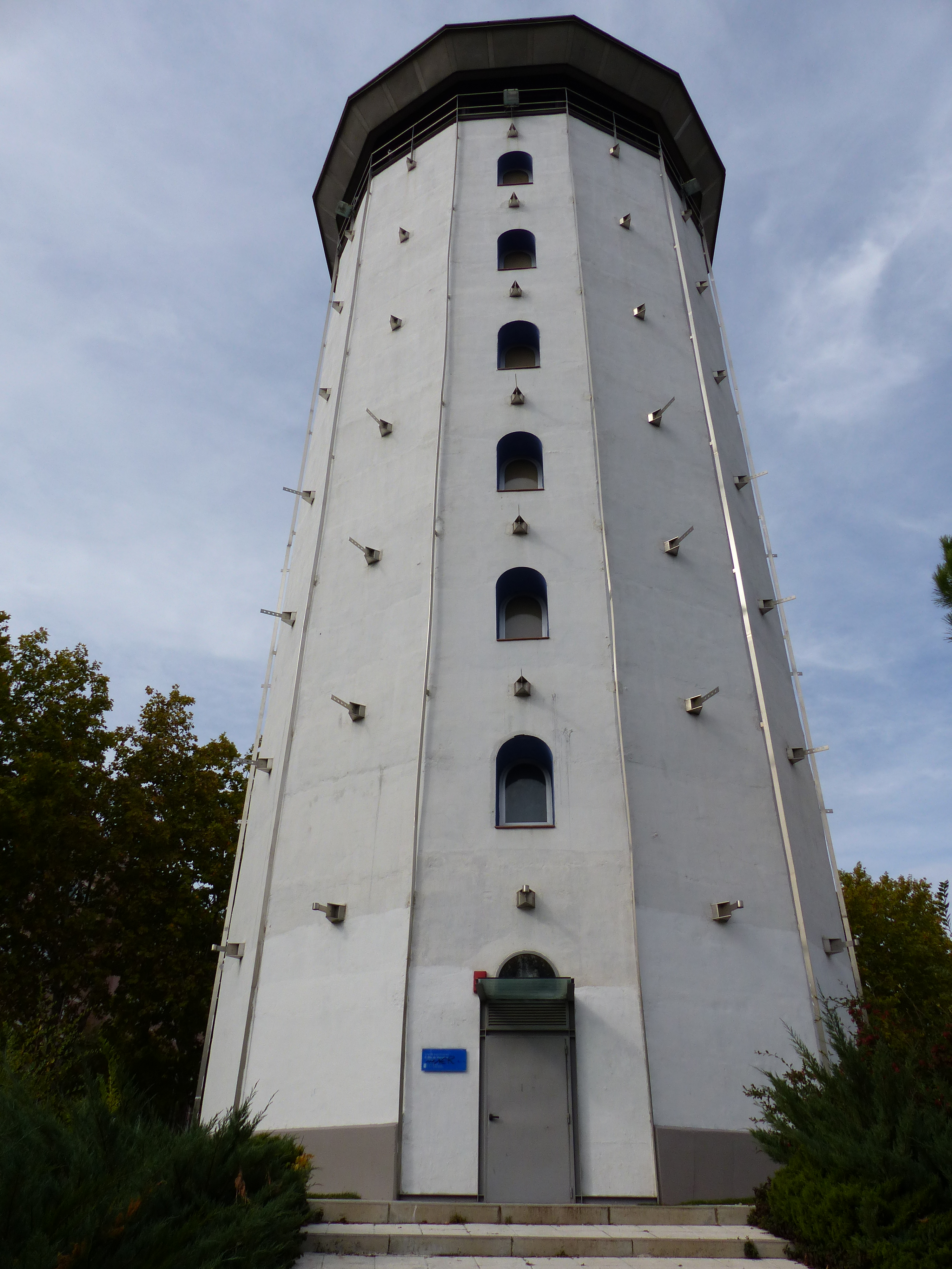 Desde el frente.